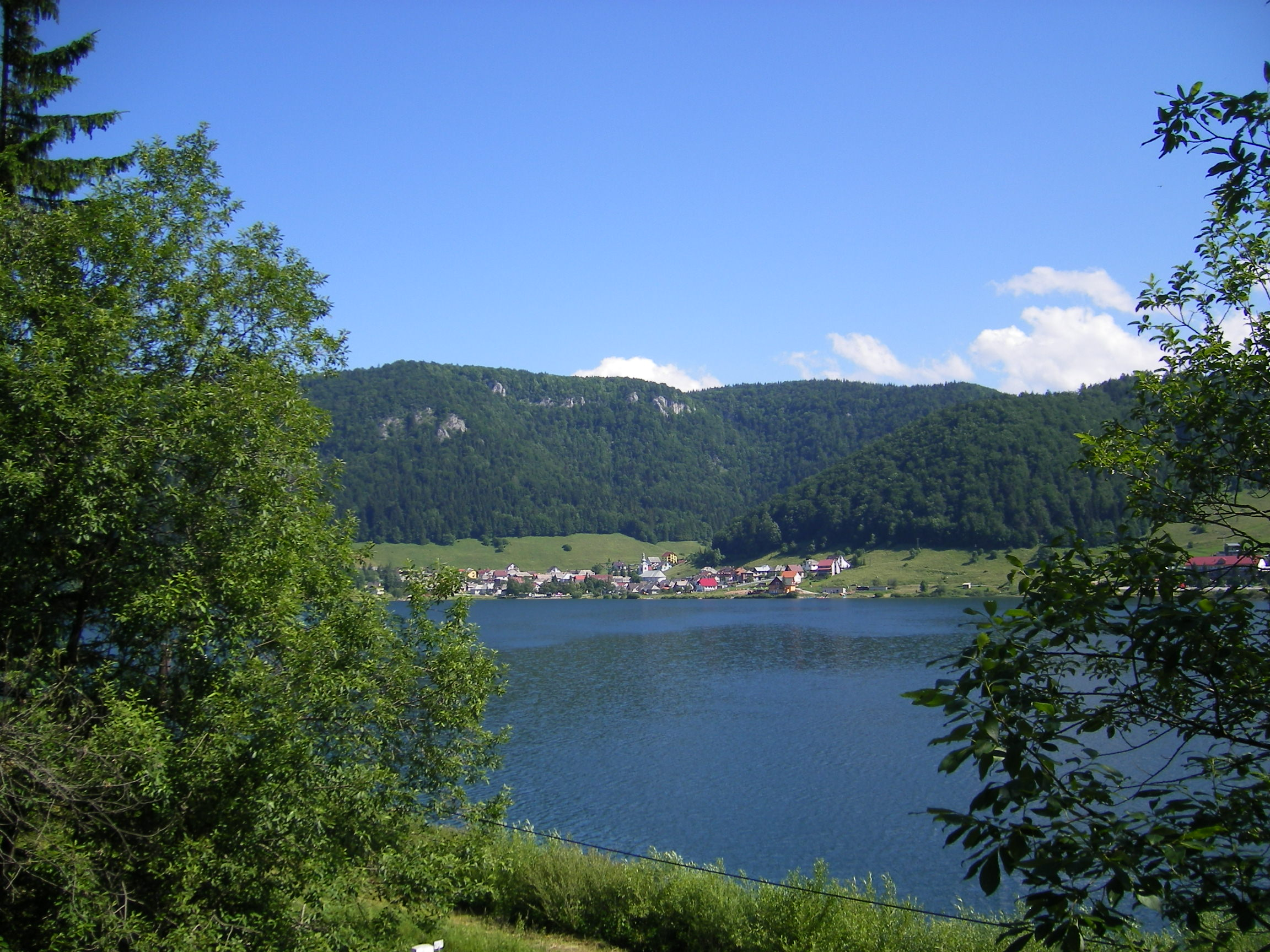 Dedinky (RV) and Palcmanská Maša reservoir